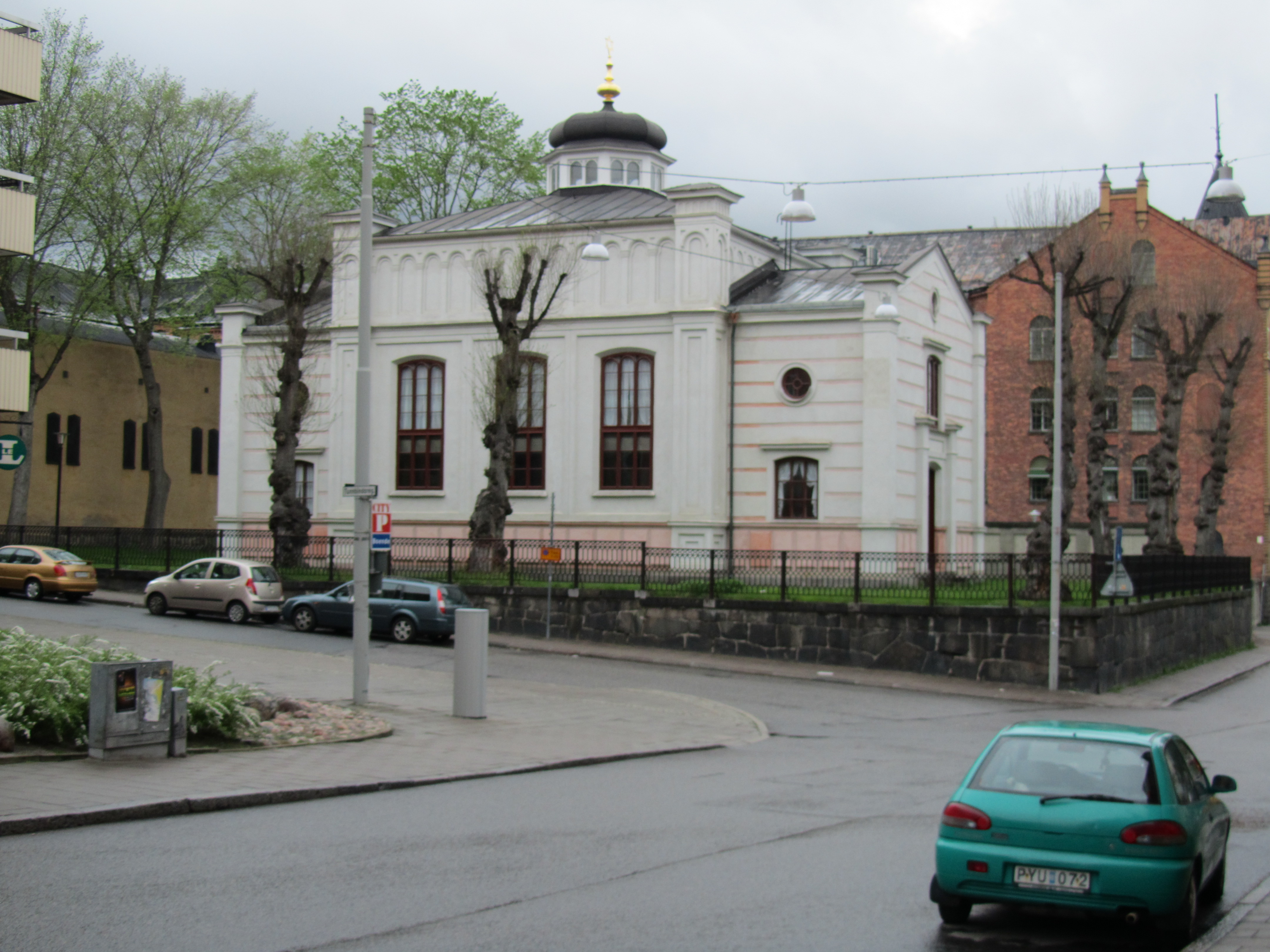 Norrköpings synagoga in Norrköping